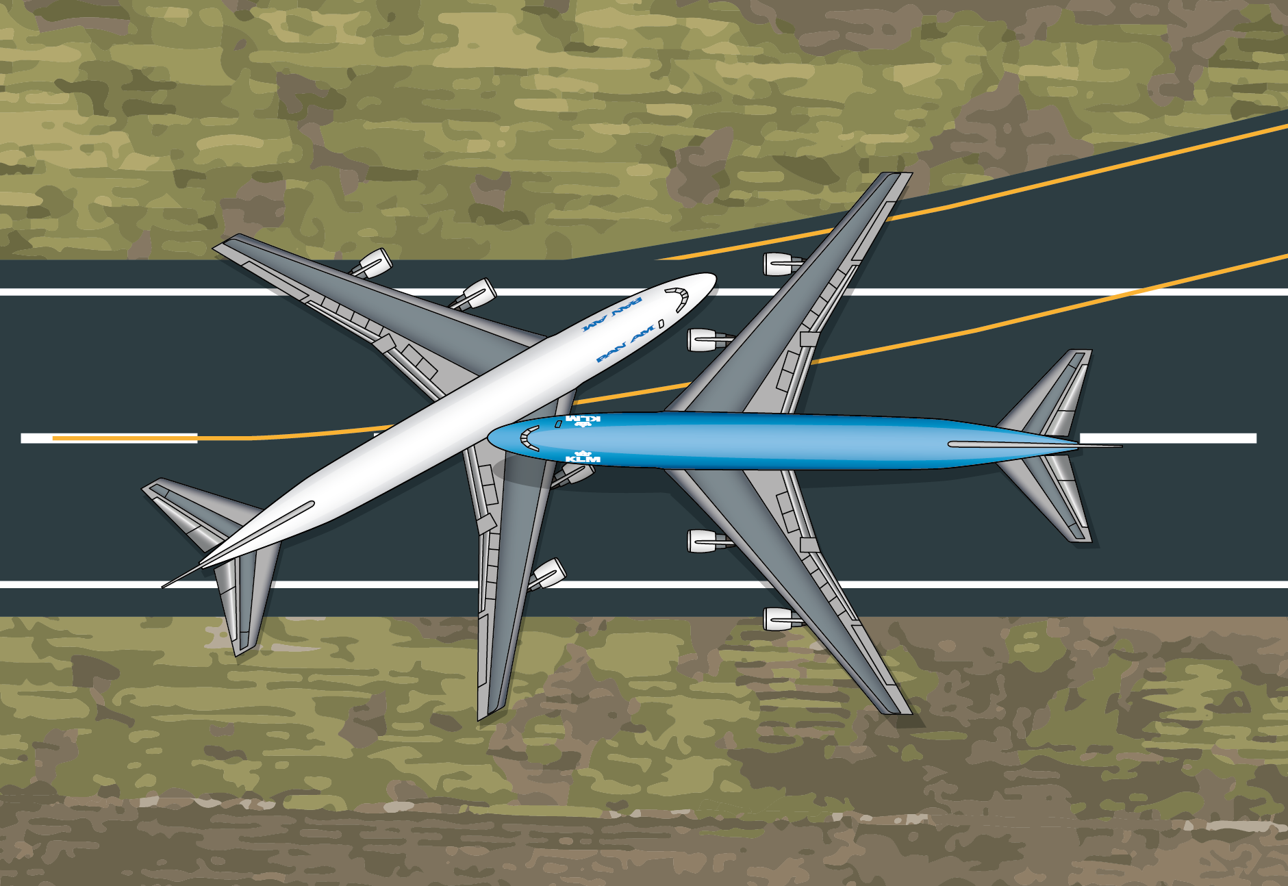 Die an der Flugzeugkatastrophe von Teneriffa beteiligten Boeing 747 nur Momente vor dem Zusammenstoß.